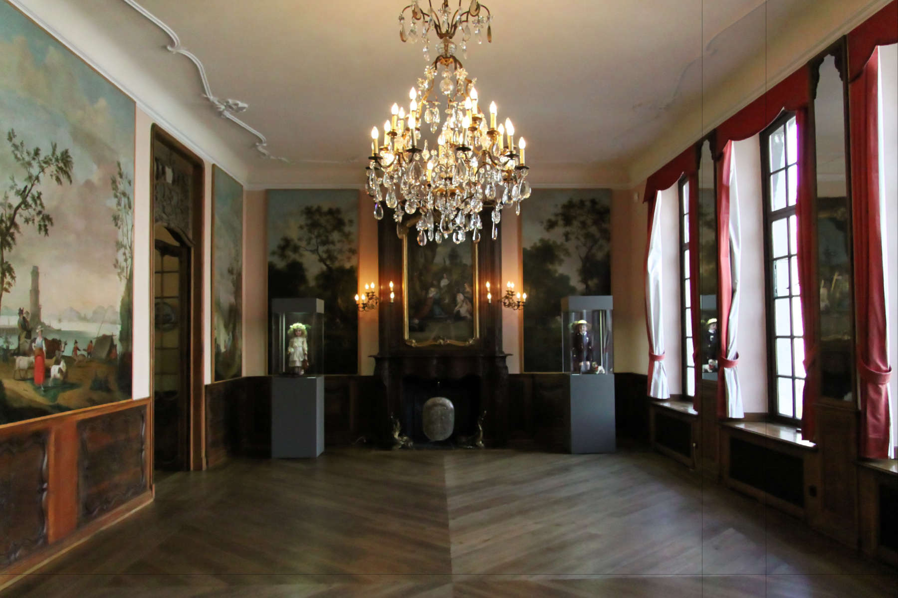 Aachen, Couven-Museum, Festsaal